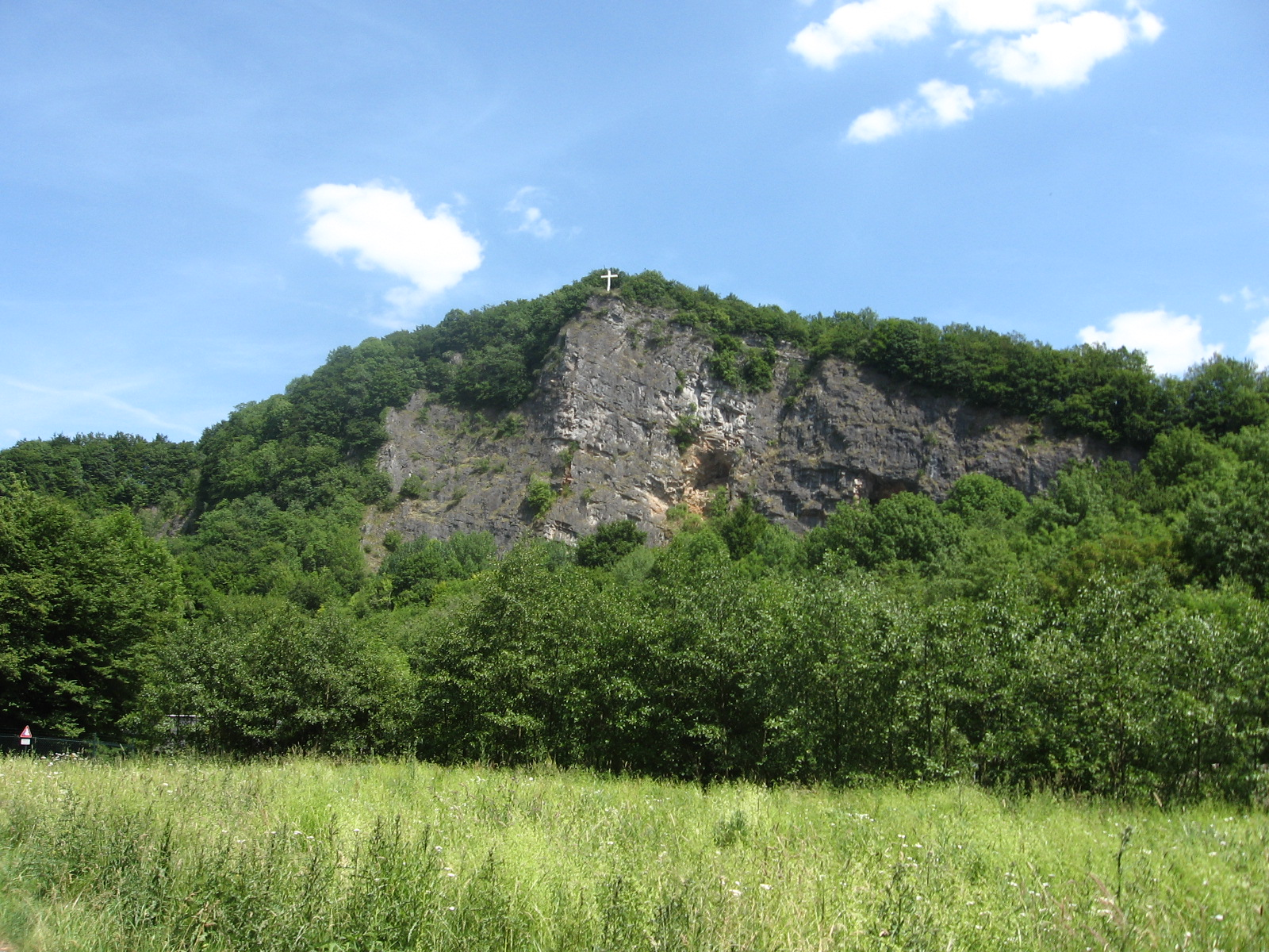 Blick zur Steinbruchwand im Naturschutzgebiet „Hohe Ley“ bei Finnentrop-Heggen